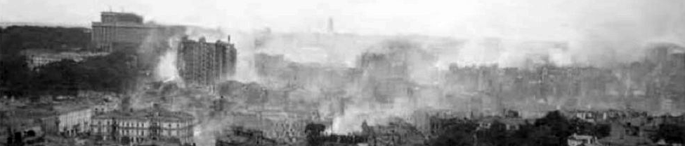 Скайлайн Києва 1940-х